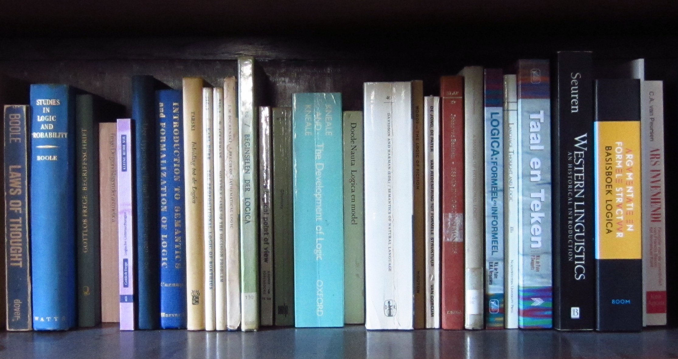 Enkele boeken over logica, waaronder ook The Laws of Thought